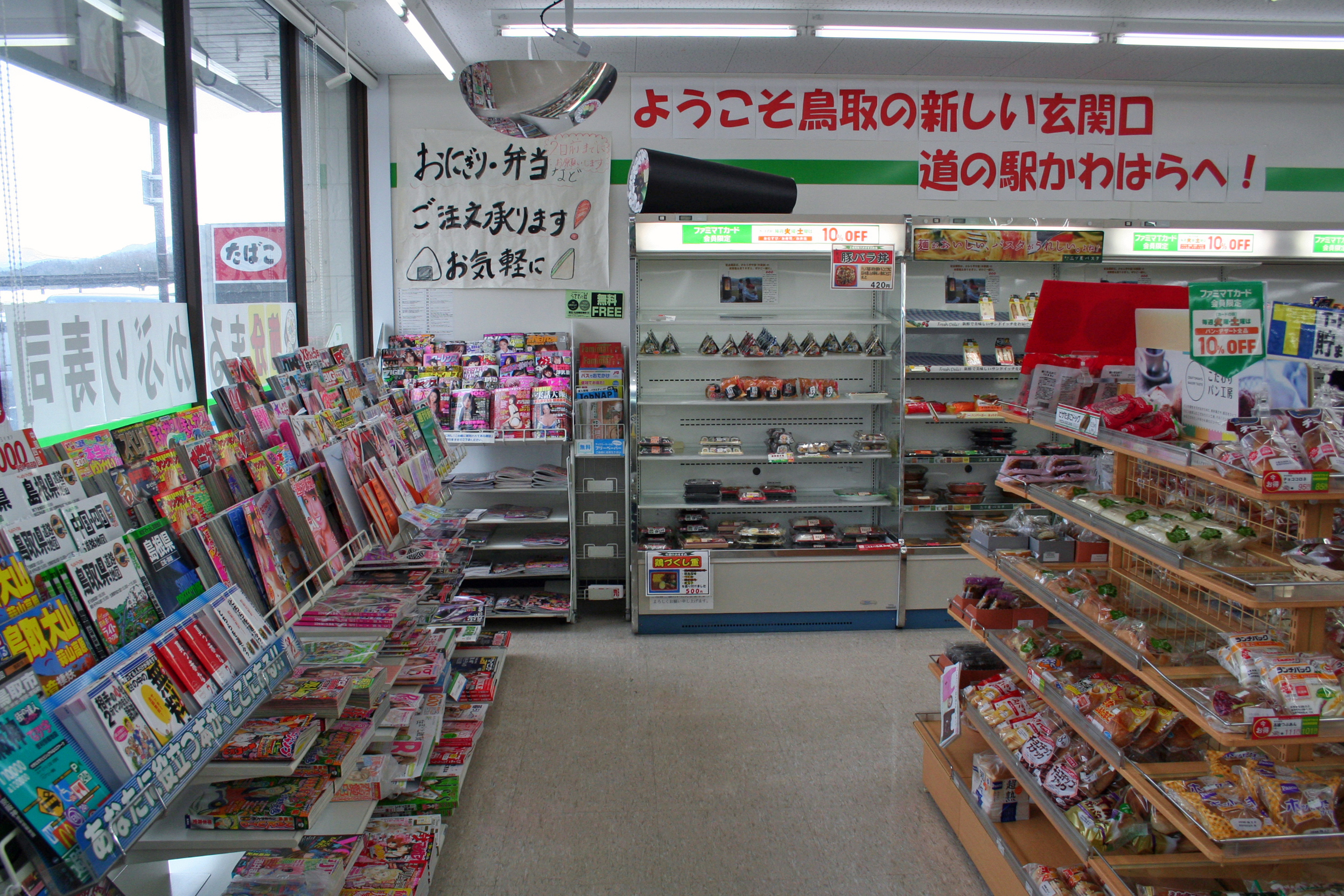 鳥取市、道の駅清流茶屋 かわはら内にある日本のコンビニエンスストアチェーンのファミリーマートの店内。